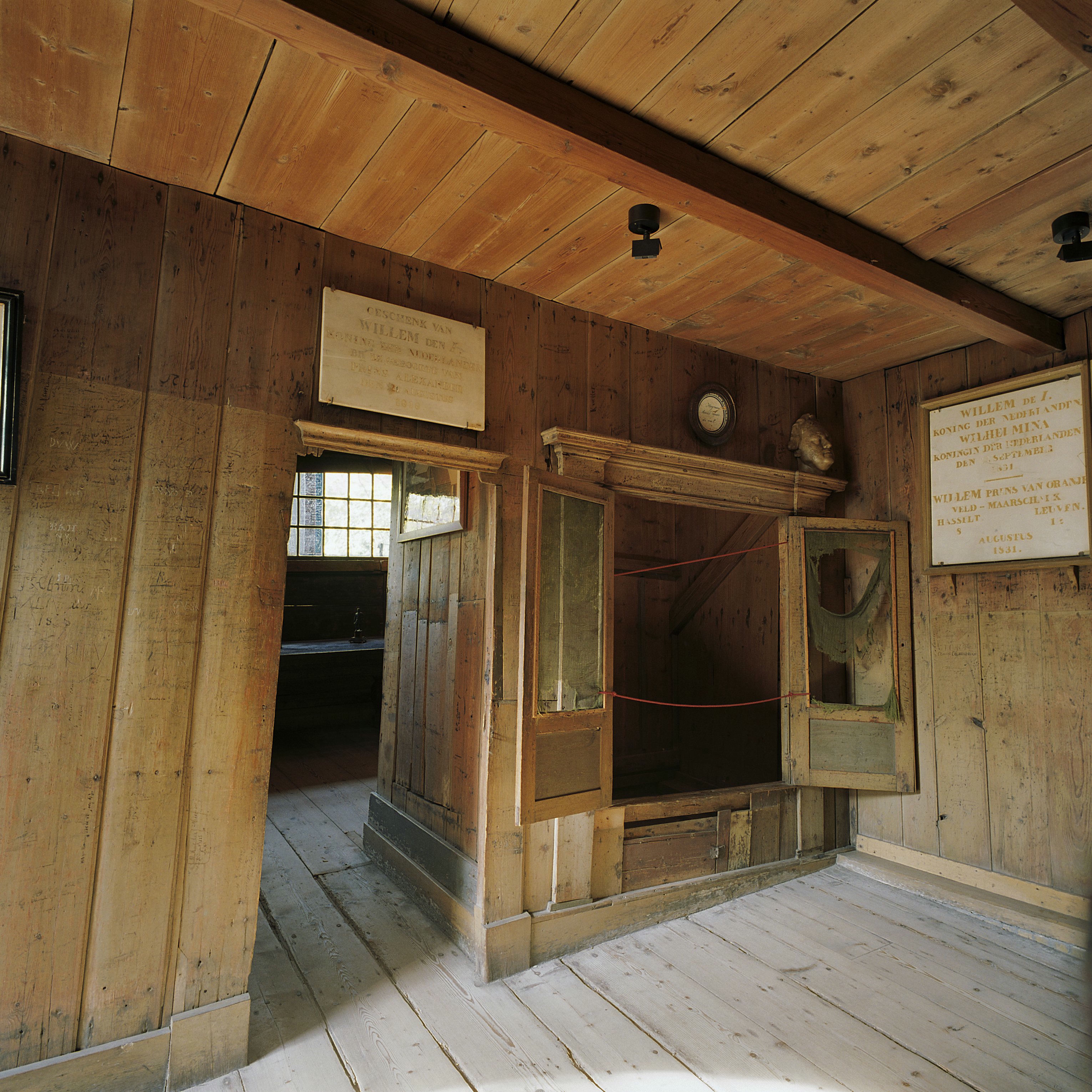 Czaar Peterhuisje - Museum: Interieur, het interieur van het houten huis binnen het stenen huis met de bedstee waar Peter de Grote in heeft geslapen